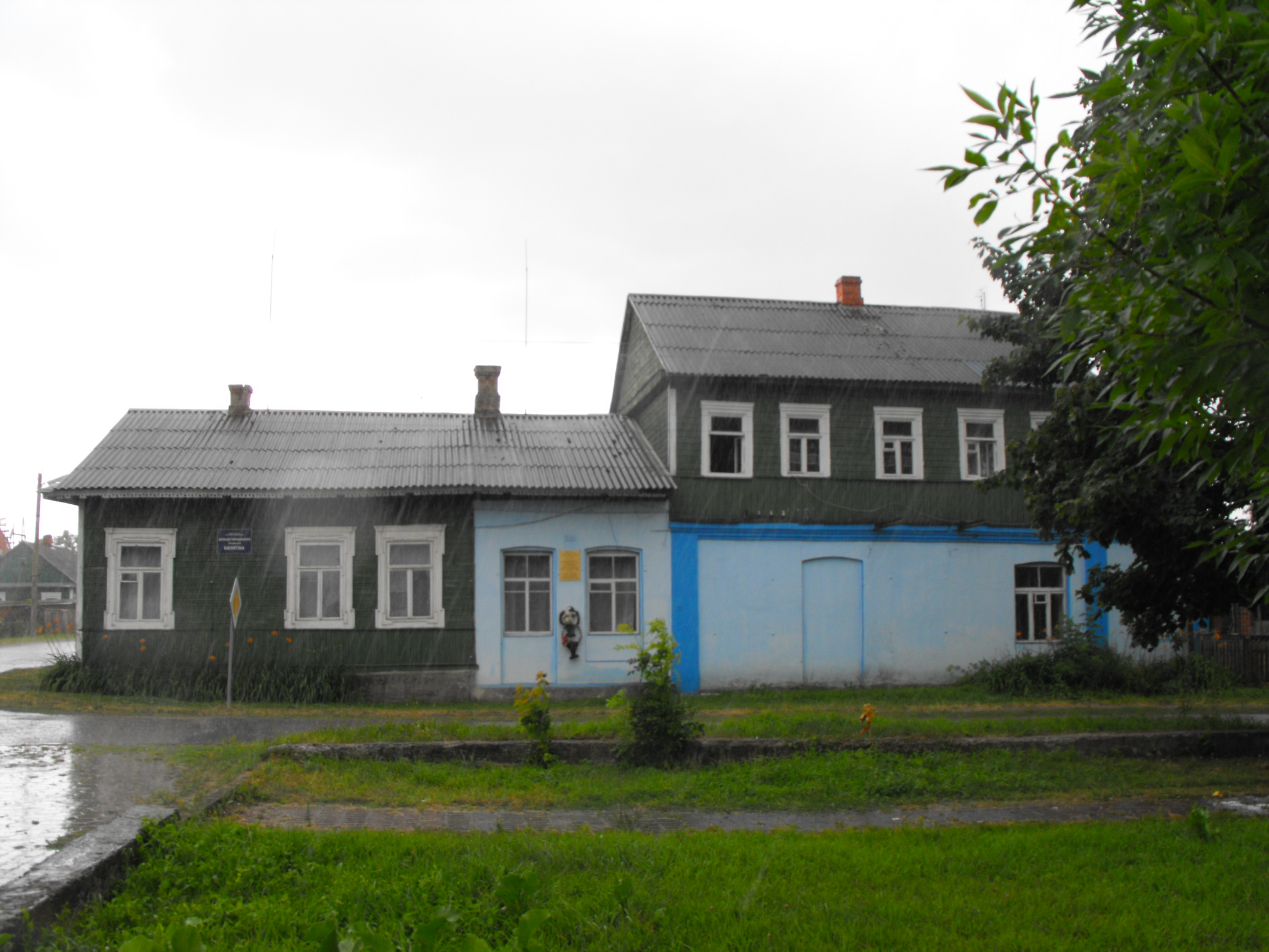 Табличка на здании библиотеки в память евреев - узников гетто в Давид-Городке, убитых нацистами и полицаями во время Холокоста.